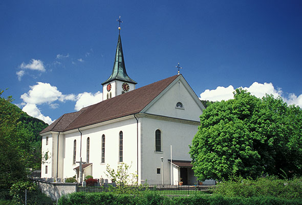 Erschwil: Kirche Sankt Peter und Paul